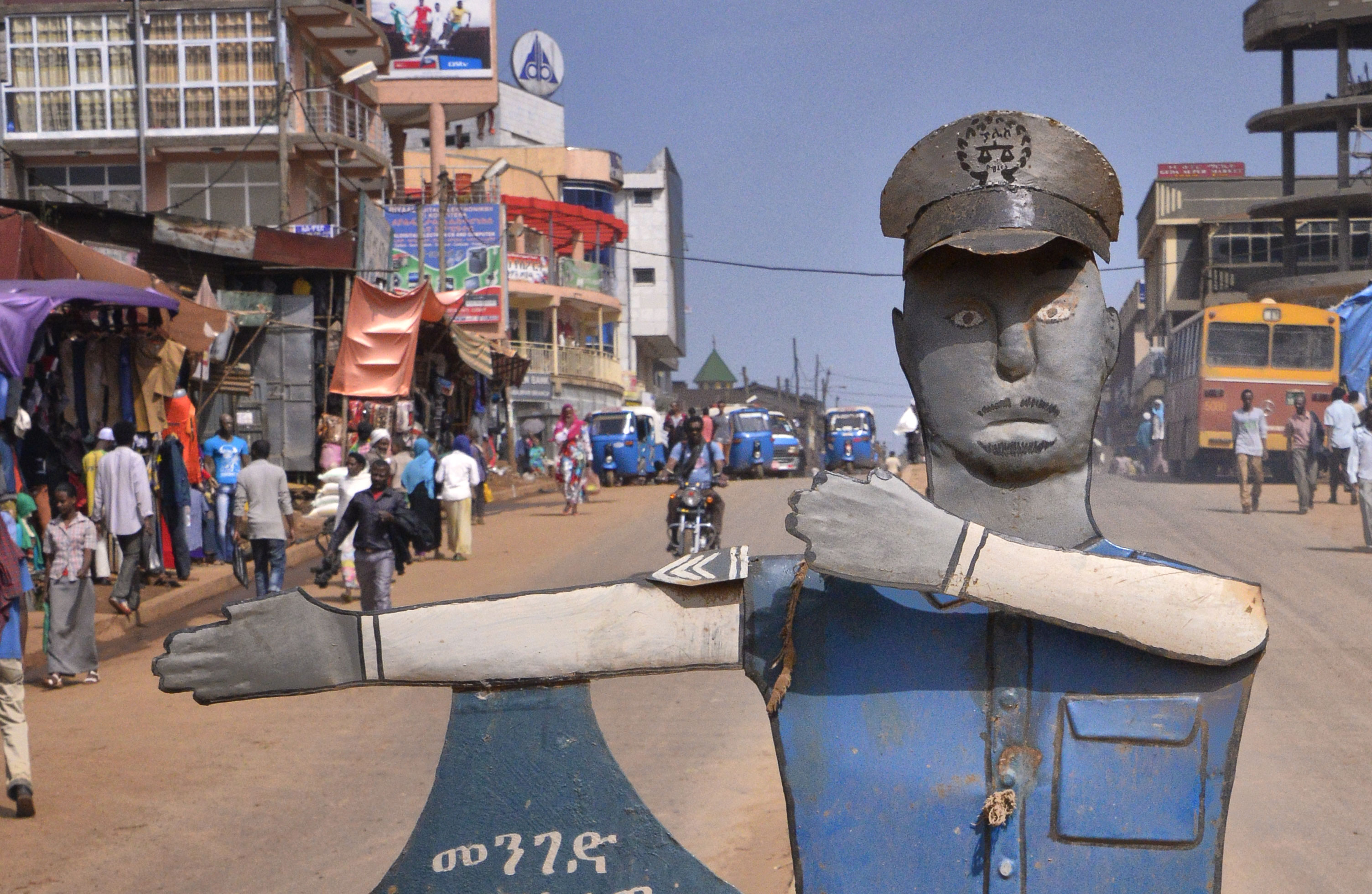 Ethiopia